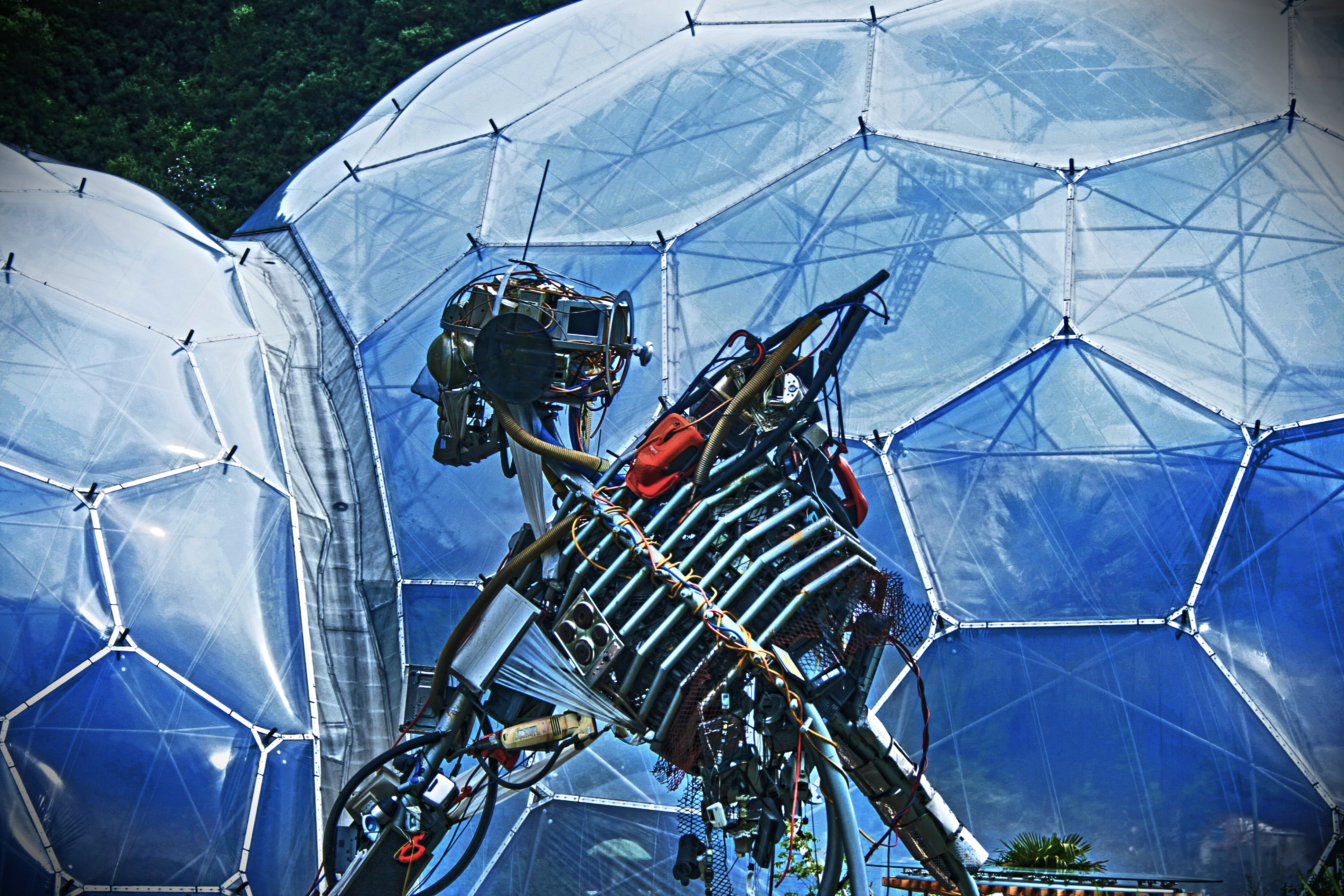 Escultura hecha con residuos de la vida moderna- los dientes son ratones de ordenador